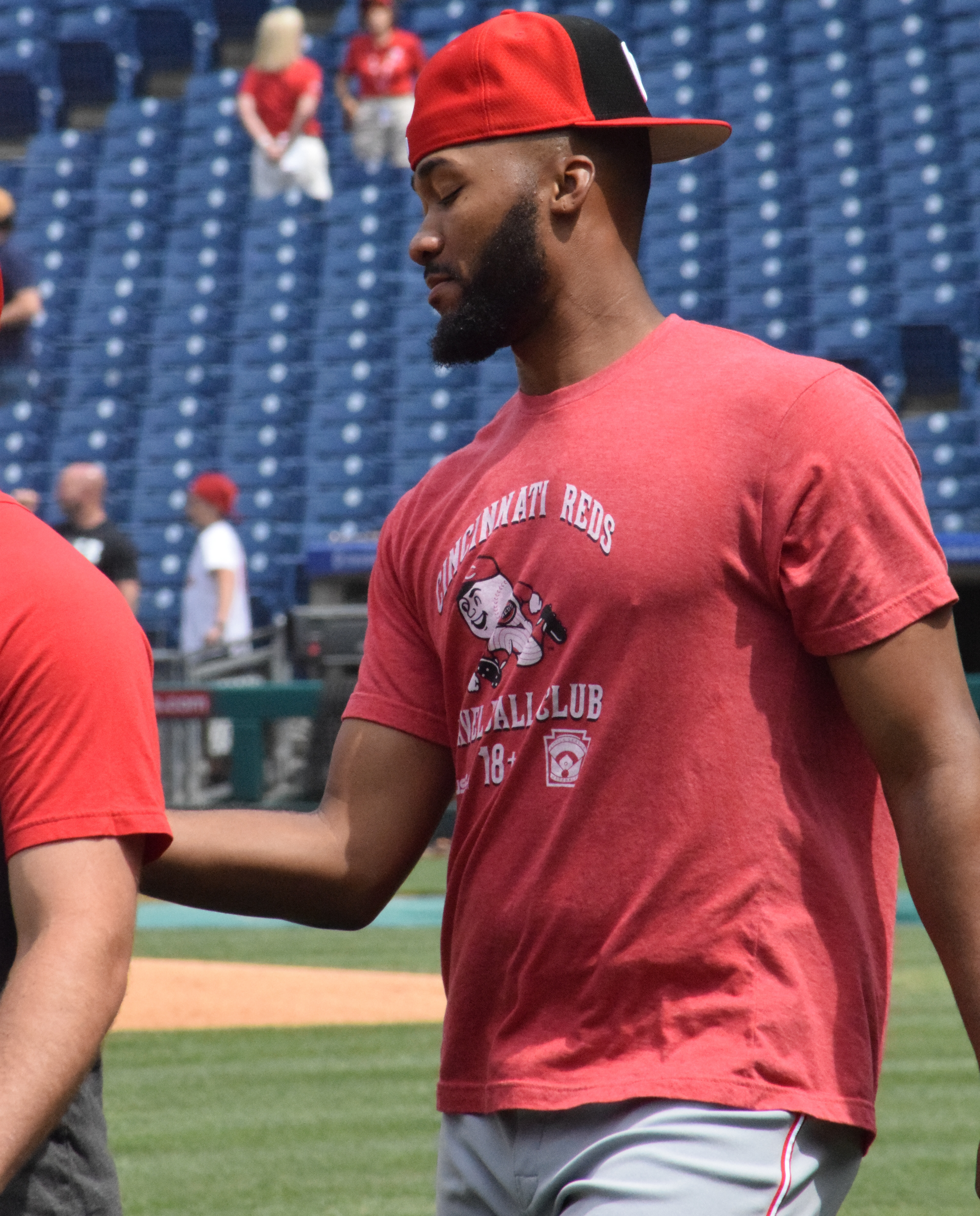 Amir Garrett